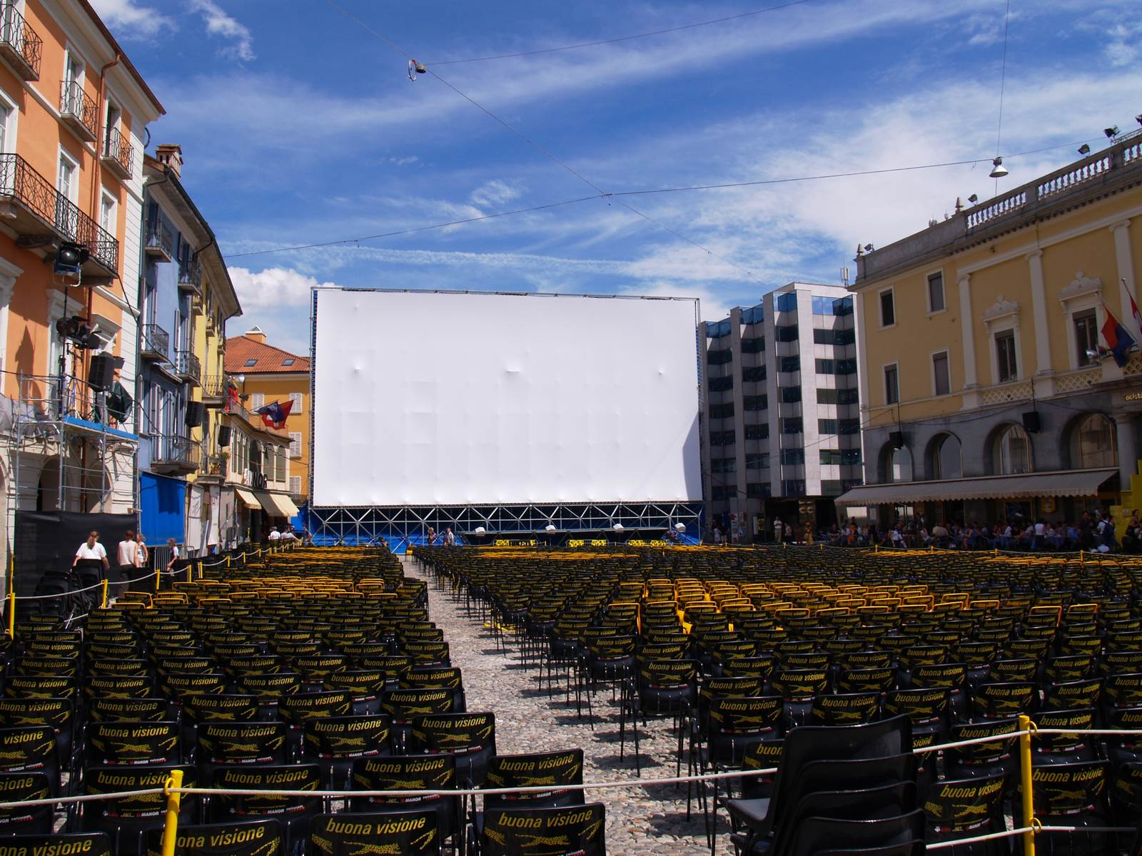 La Piazza Grande a Locarno (Svizzera) durante il Festival Internazionale del Film. Foto: S. Müller